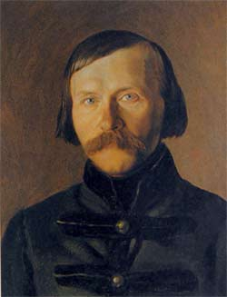 Pëtr Vasil'evič Kireevskij (1808-1856)